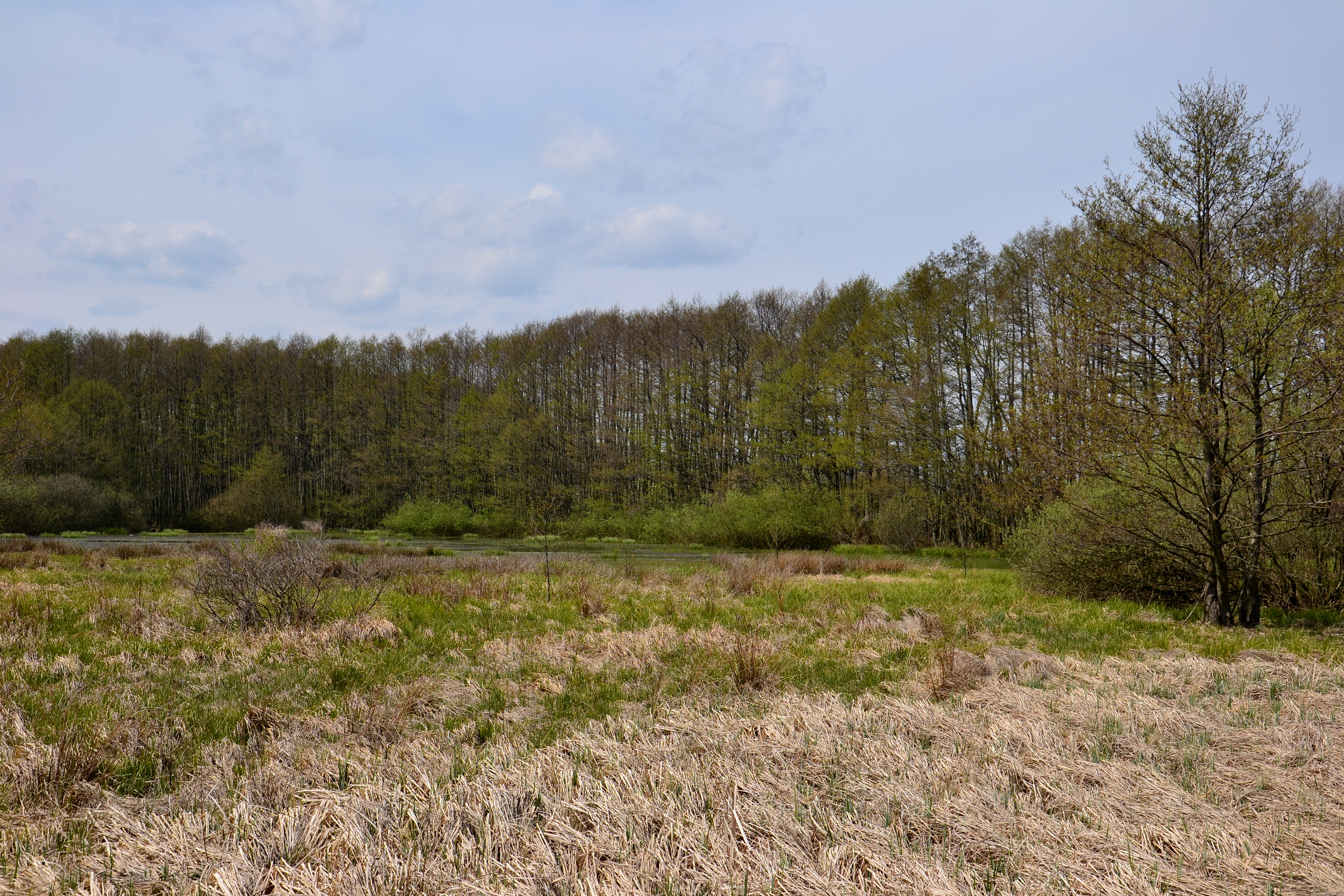 Vrbina u Nové Vsi – východní část chráněného území s mokřadem